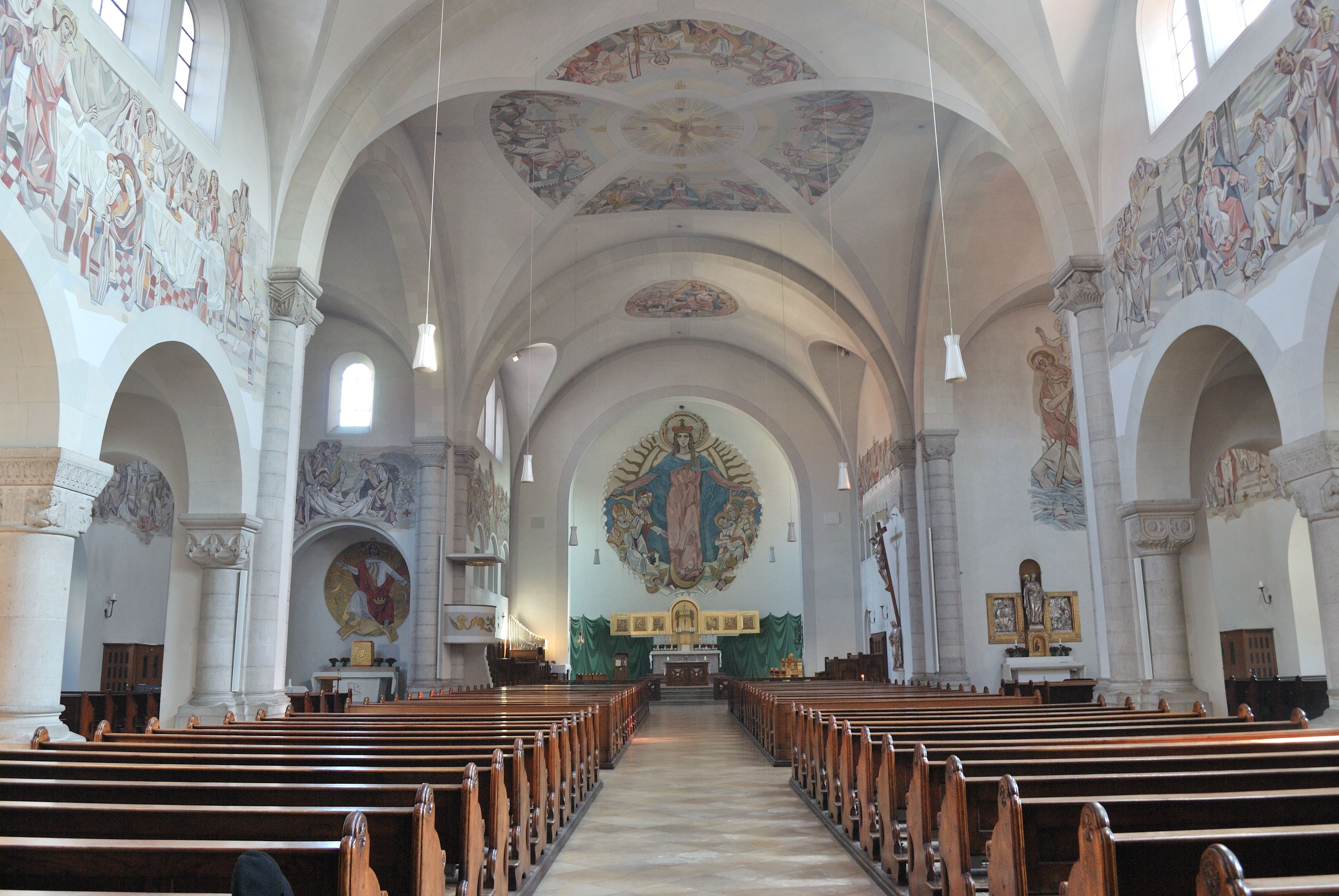 Das Innere der Kirche mit Blick zum Altarraum